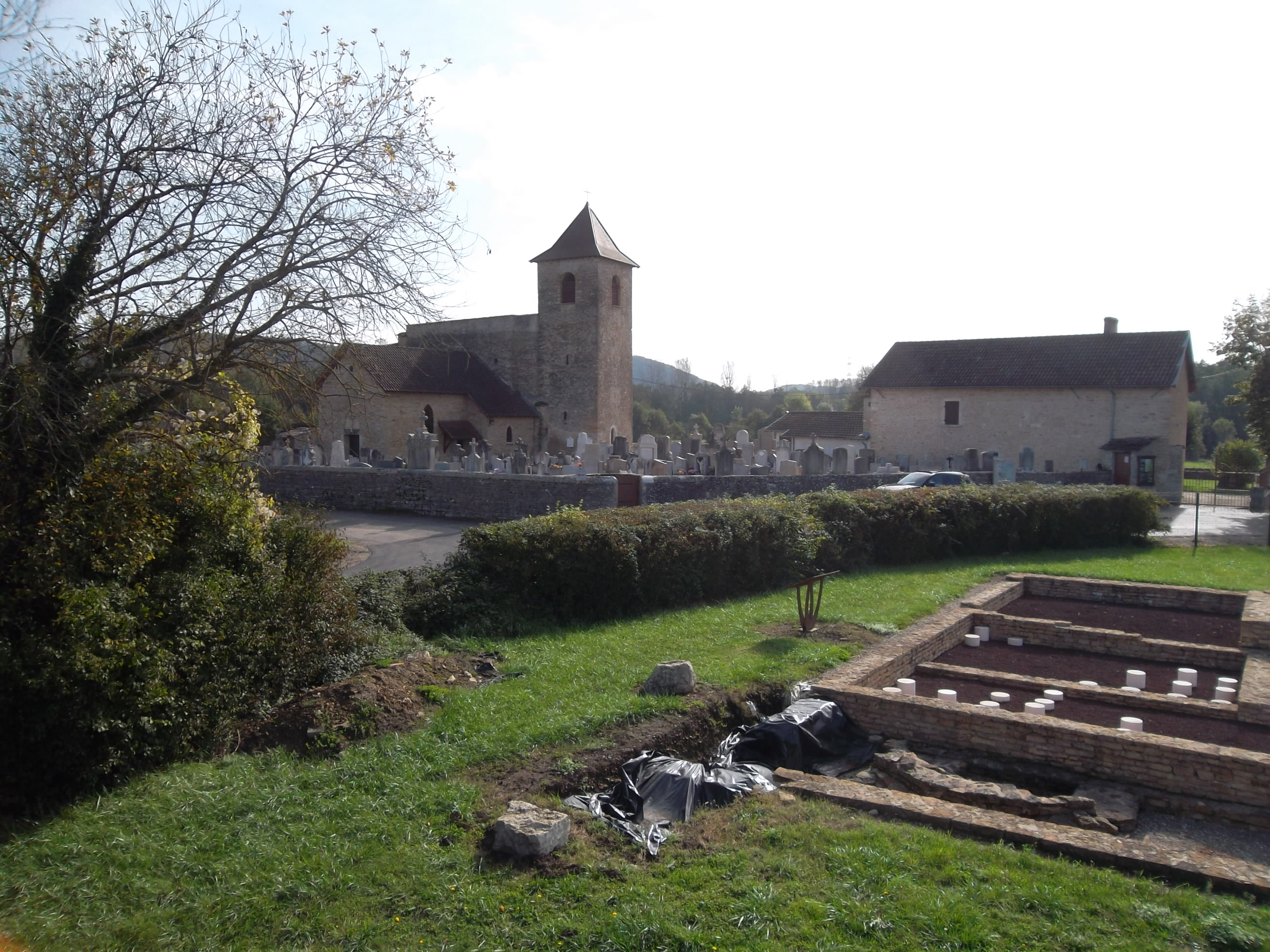 Villa gallo-romaine (vestiges) de Saint-Romain-de-Jalionas.